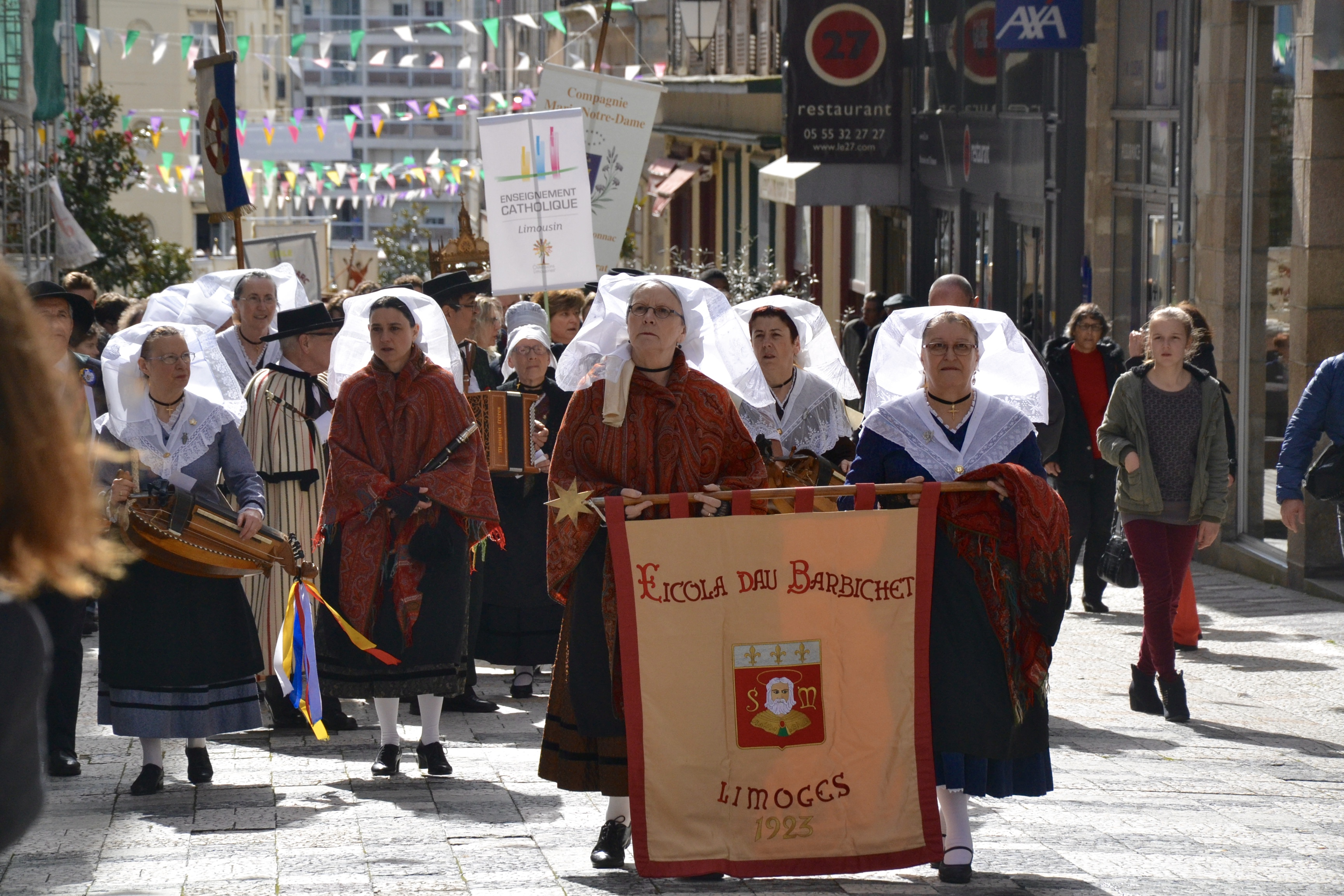 Procession des Ostensions de Limoges, 2016.